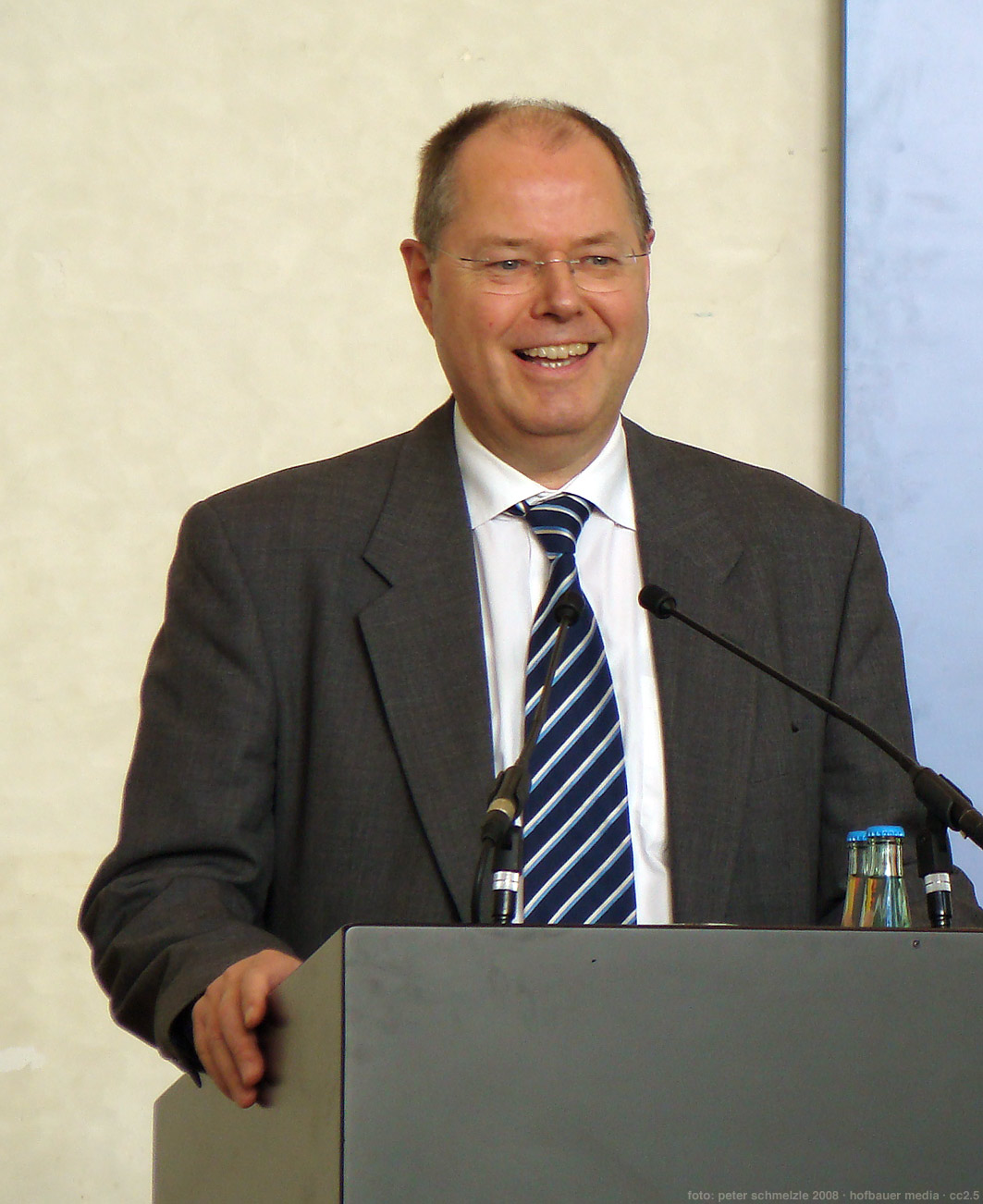 Finanzminister Peer Steinbrück in der Bundeskunsthalle in Bonn am 9. Mai 2008 im Rahmen der Übergabe der von James Rizzi gestalteten Briefmarken an den Deutsche-Post-Vorstandsvorsitzenden Frank Appel.